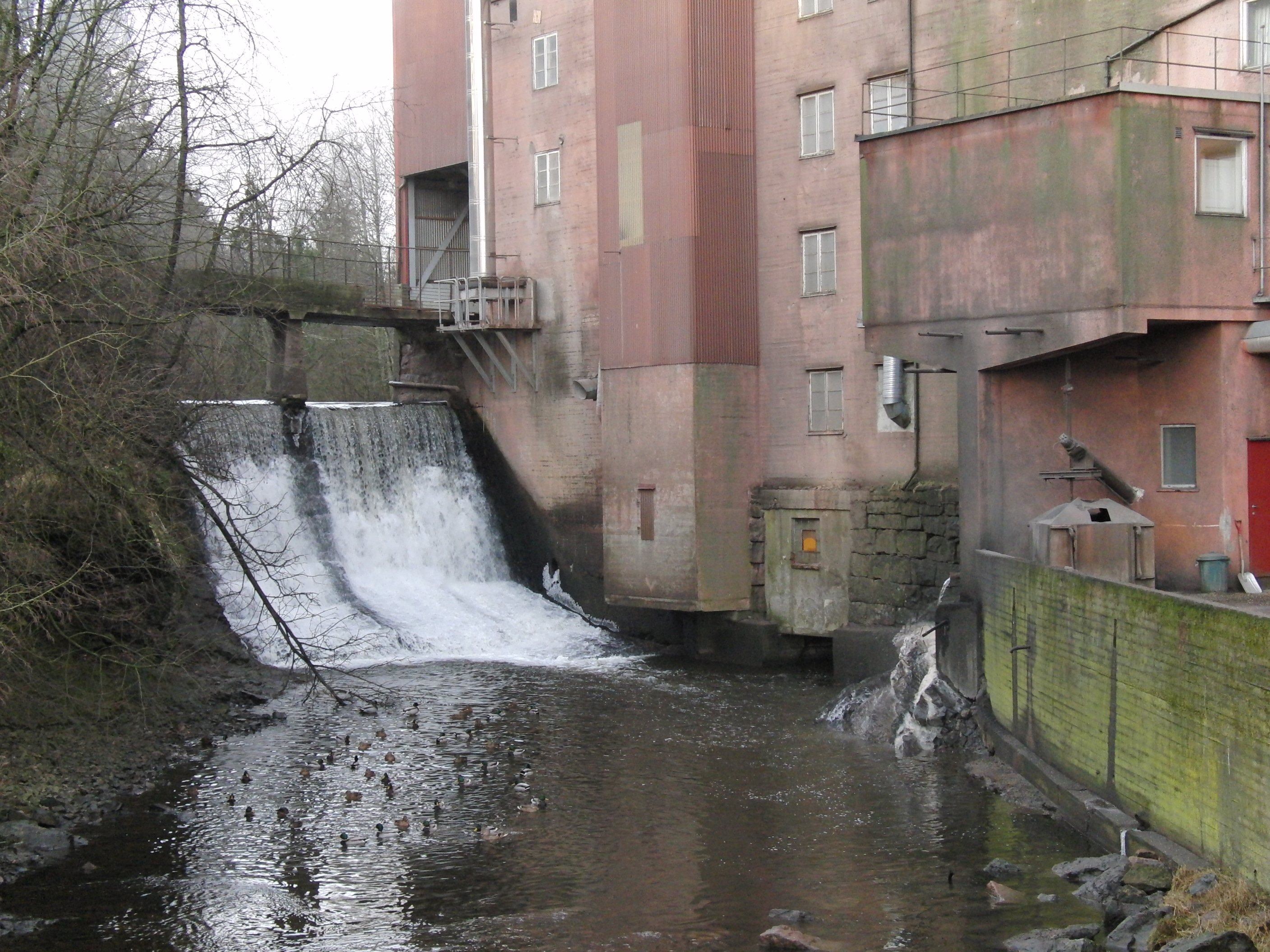 Borgen kraftverk